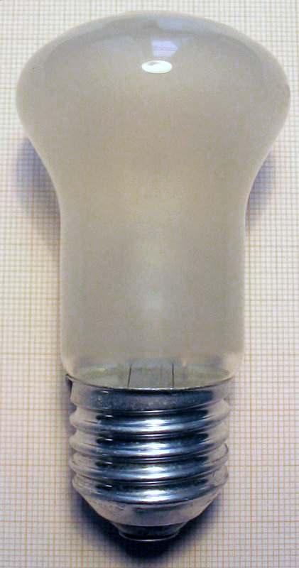 Krypton-Glühlampe 230 Volt, 60 Watt, matt